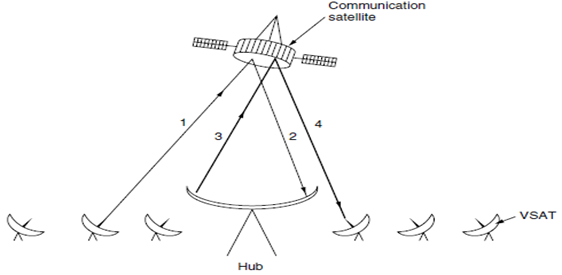 Hub istifadə edən VSATs-lar